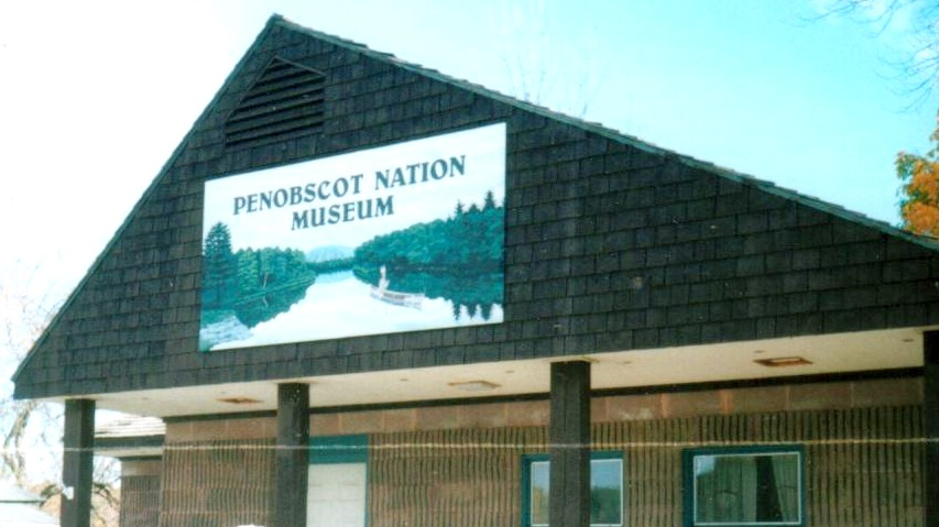 Penobscot Museum's poster. 16-10-2000.